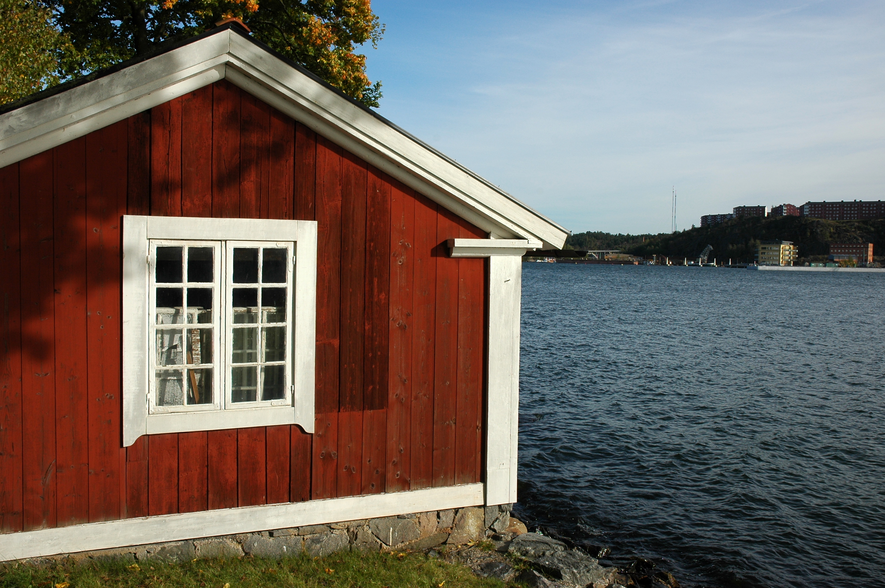 Dom stojący na nabrzeżu wyspy Djurgården w Sztokholmie